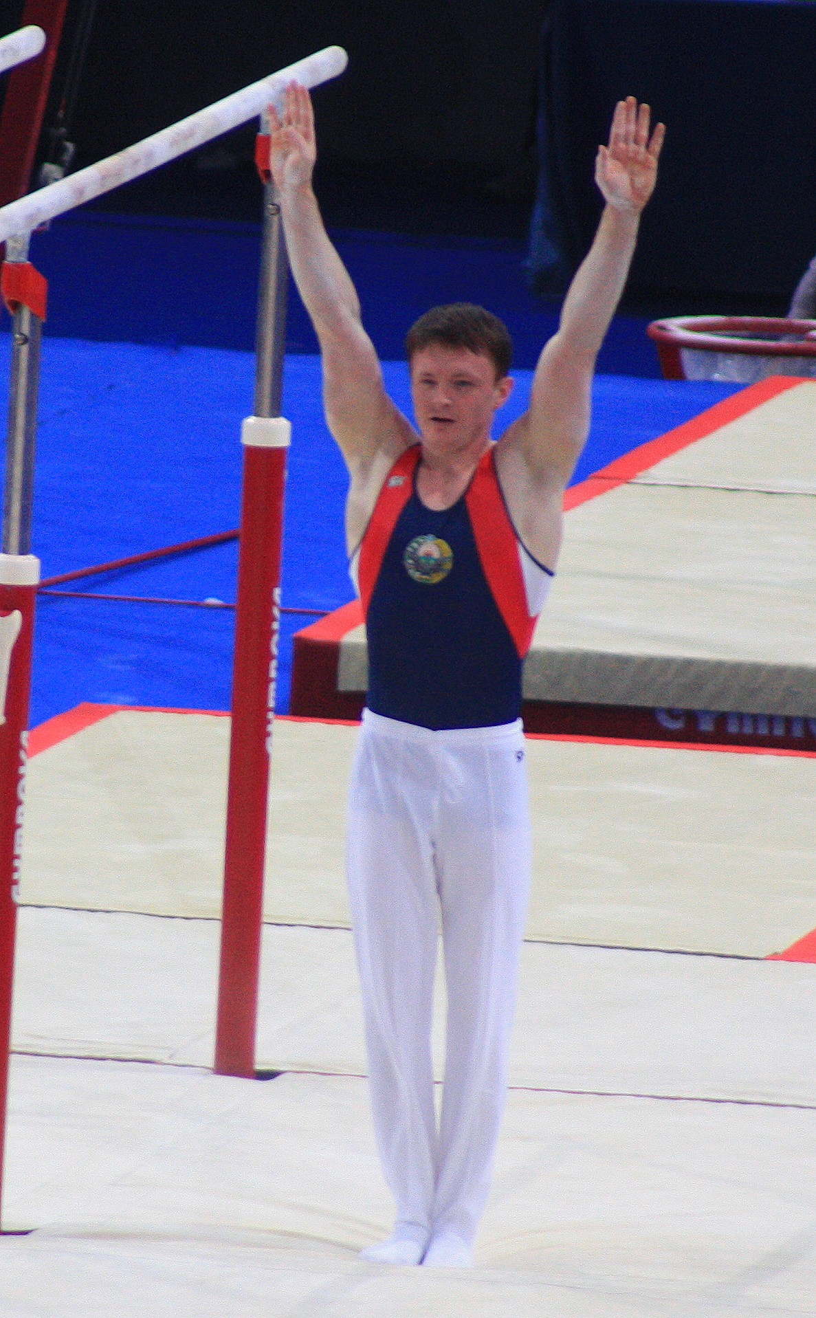 Anton Fokin à la réception de son mouvement en finale des barres parallèles des 17e Internationaux de France en 2010.